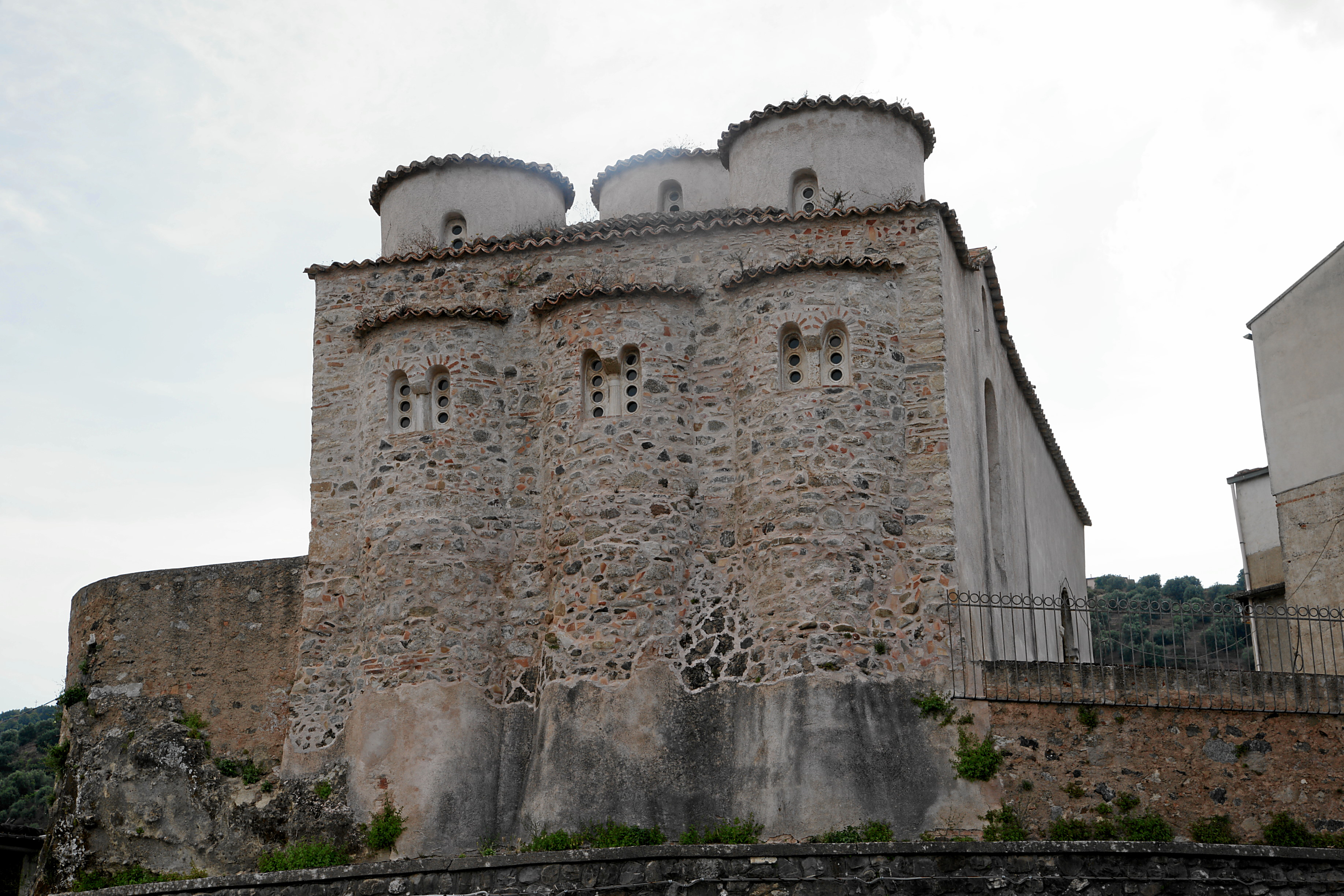 Rossano: Oratorio San Marco